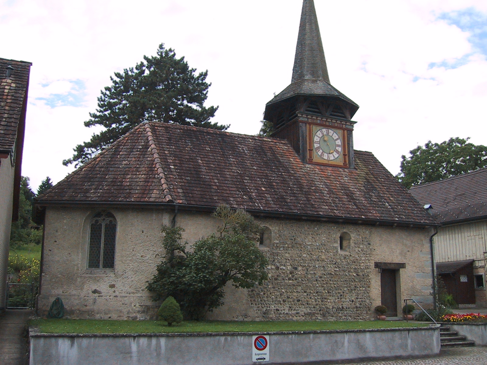 Kapelle St. Niklaus in Triboltingen, Kanton Thurgau